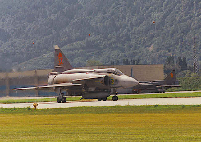 Starting Saab 37D Viggen at Flughafen Sion, an air show